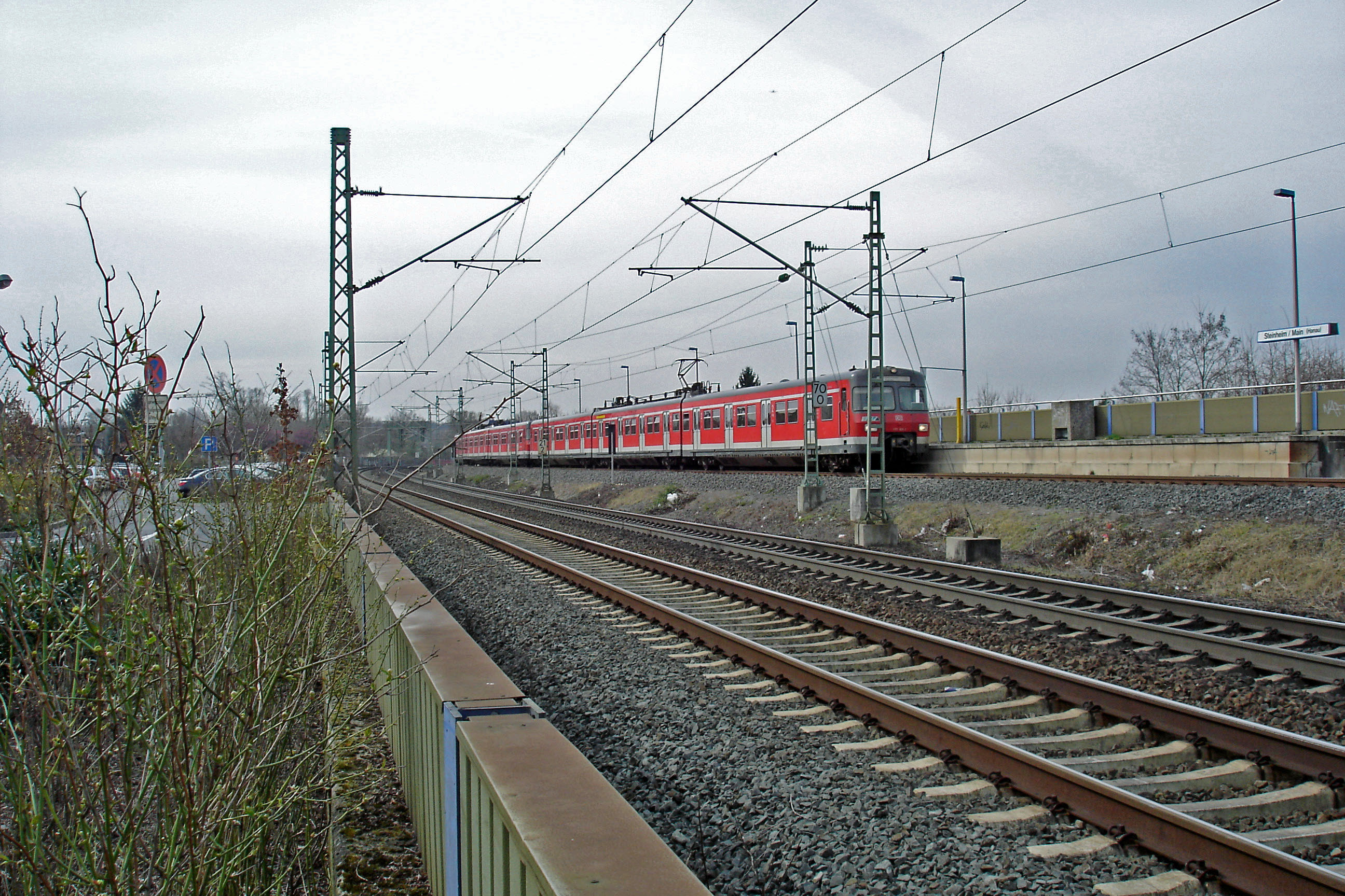 S-Bahnstation in Hanau-Steinheim